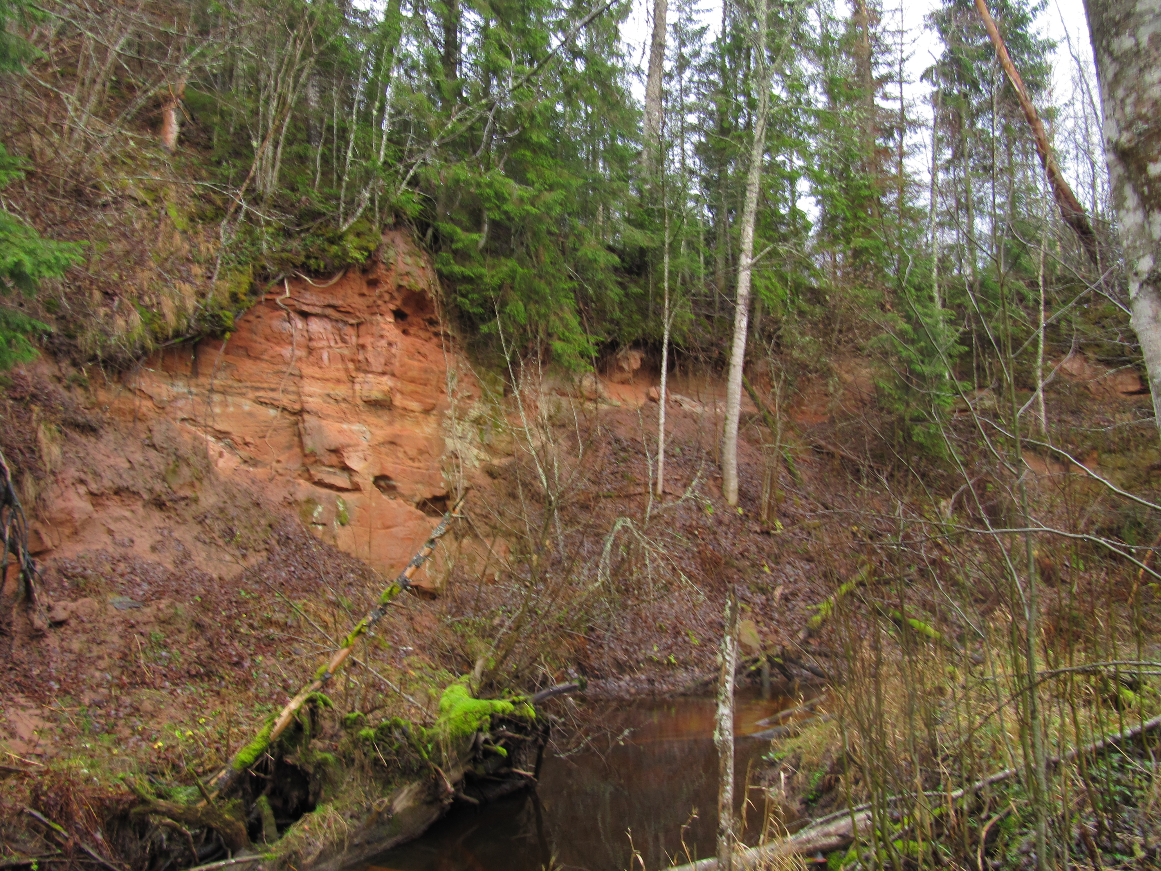 Saadu paljand Lüütre oja paremal kaldal Saadu talukoha lähedal Abja vallas.